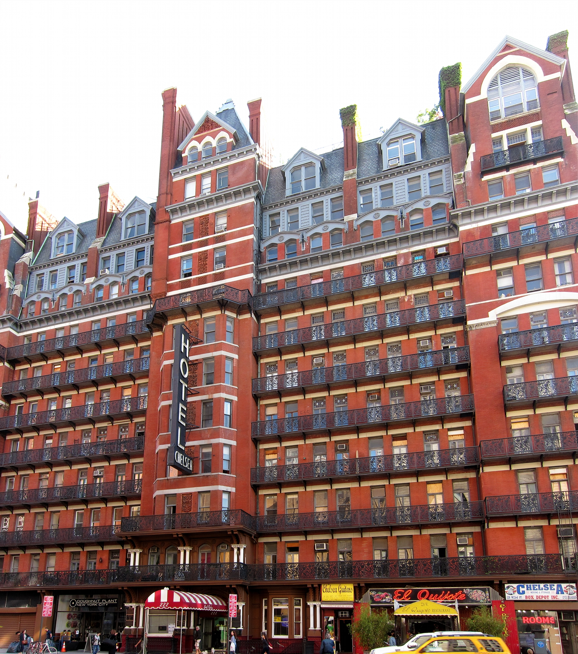 The Hotel Chelsea, New York City.